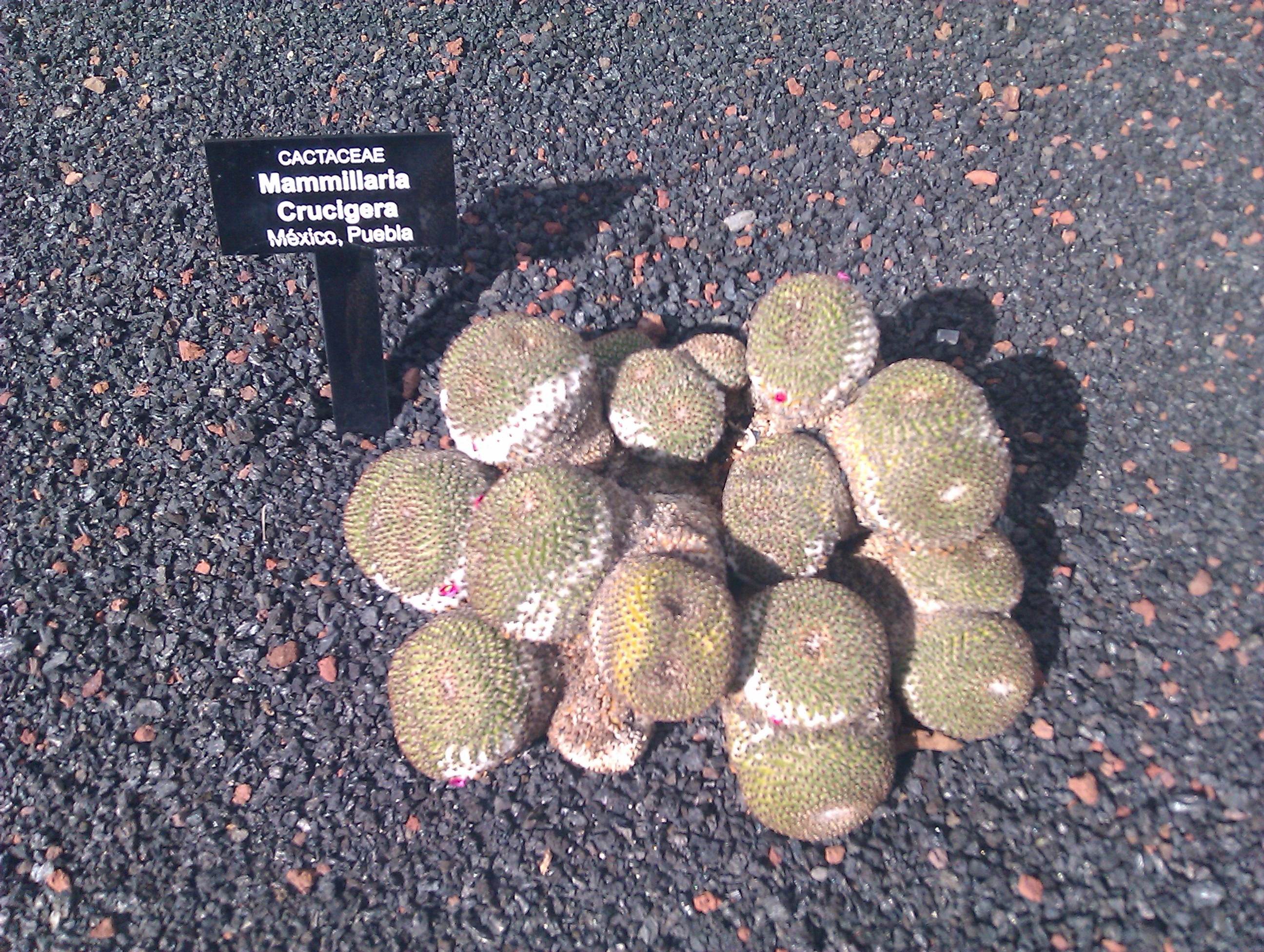 Photo taken at Jardín de Cactus, Lanzarote, Spain. Mammillaria crucigera.